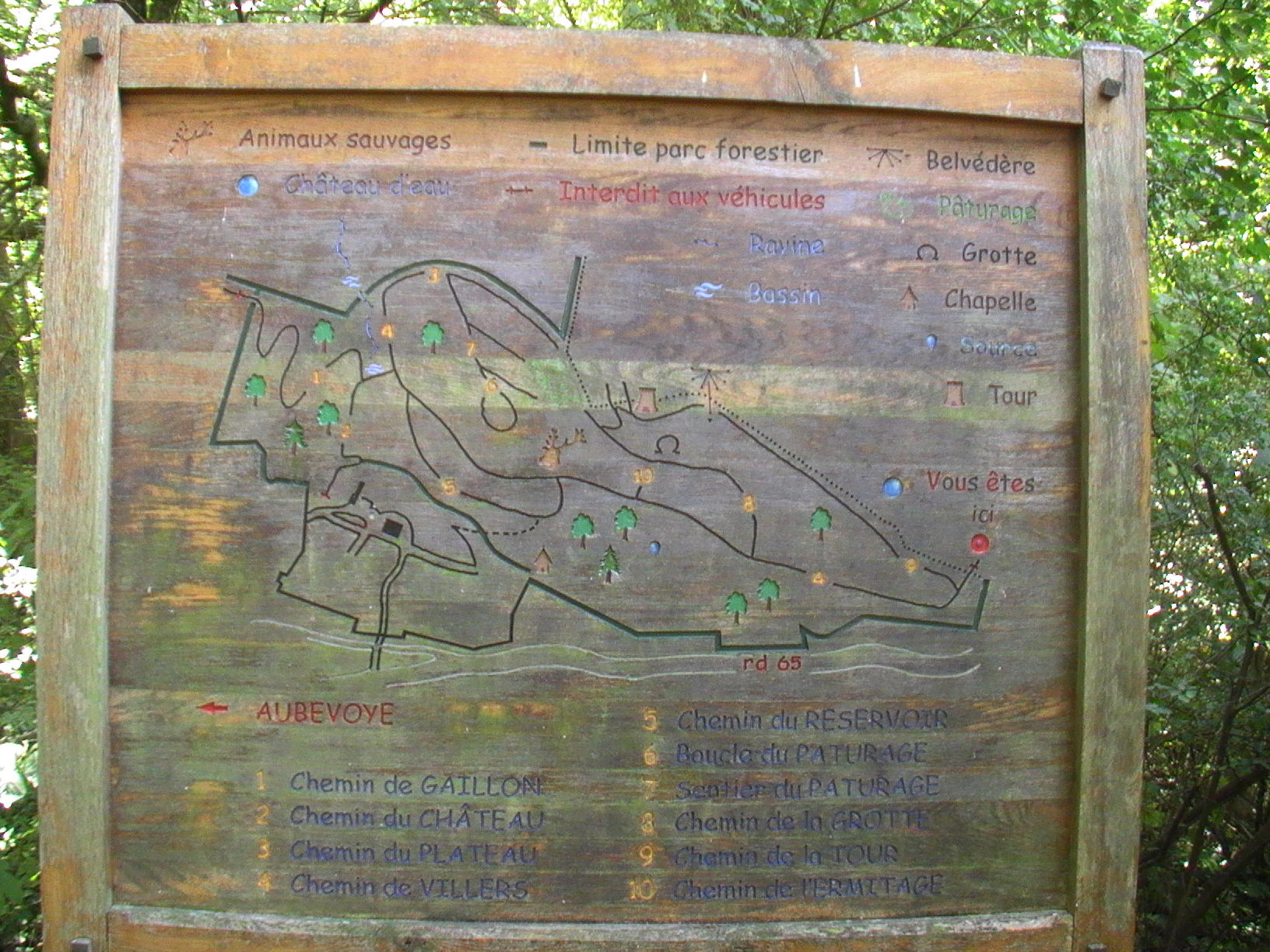 Villers-sur-le-Roule - carte des sentiers pédestres entre Villers et Gaillon - prise dans les hauteurs du château de Tournebut